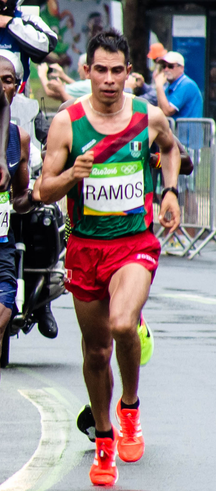 Pelotão líder da Maratona Rio 2016 na segunda volta no Aterro do Flamengo. É possível identificar o medalhista de ouro Eliud Kipchoge, do Quenia and e o medalhista de bronze Galen Rupp, USA.